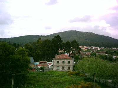 Xiabre Mountain in Villagarcía de Arousa (Spain)